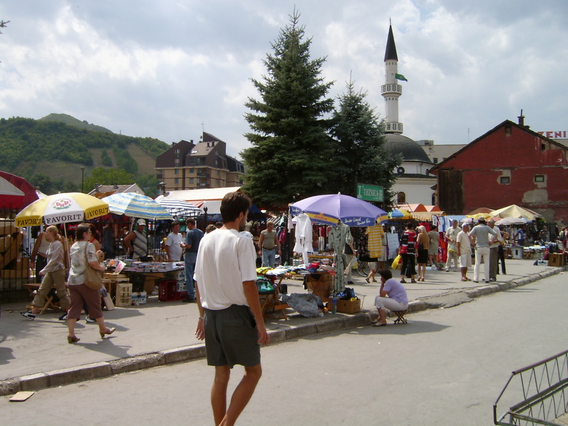 Vue de l'entrée du marché de ZENICA (Bosnie Herzégovine)